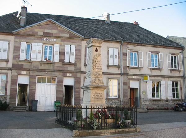 Mairie, monument aux morts et école de Mersuay 2013